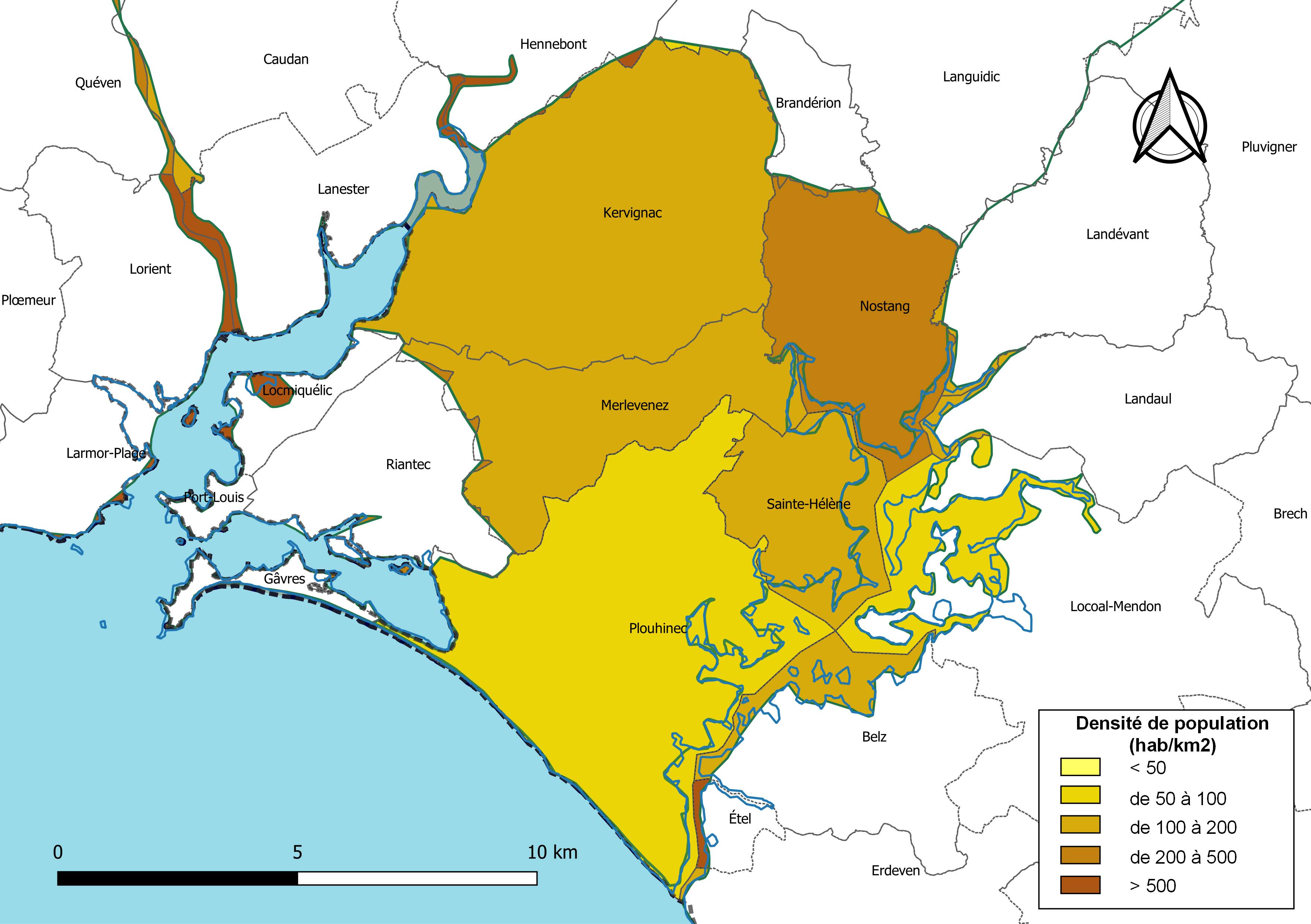 Carte des densités de population (millésimée 2016) des communes de la Communauté de communes de Blavet Bellevue Océan, département du Morbihan, France. Composition au 1er janvier 2019.